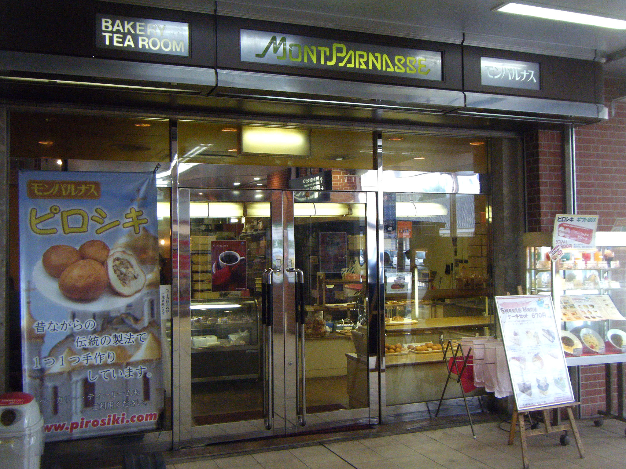 モンパルナス店舗入口 阪神尼崎駅西改札口横